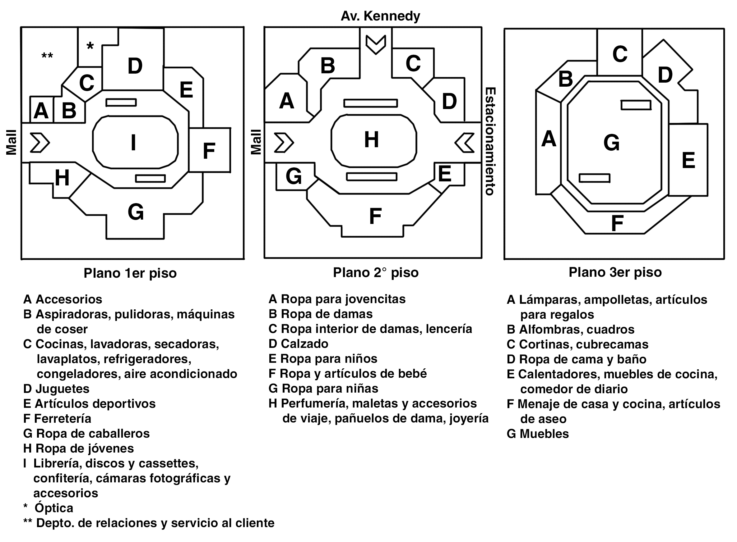 Plano de la tienda departamental Gala-Sears en el centro comercial Parque Arauco en abril de 1982.